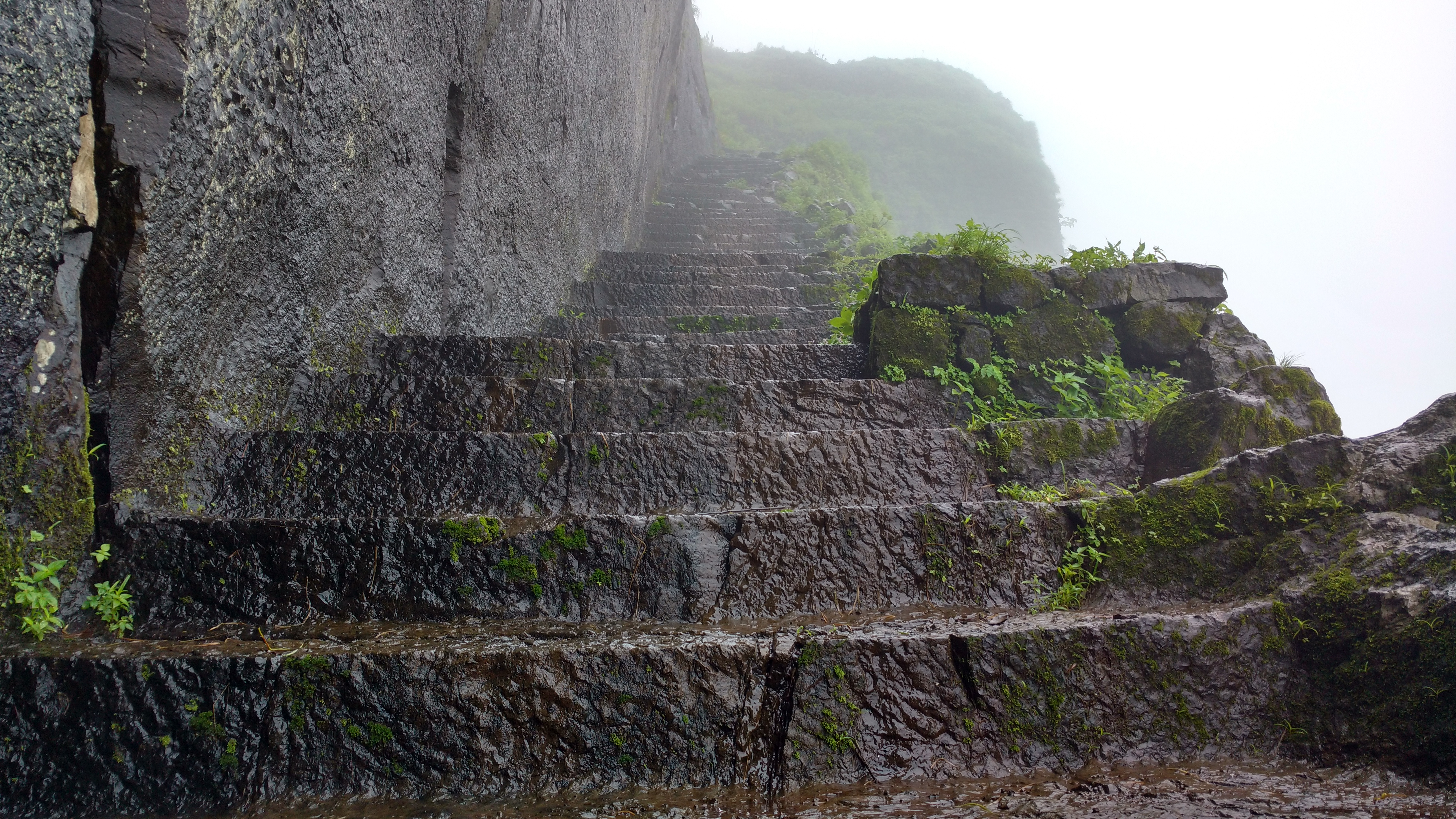 Kenjalgad Fort; Rock cut steps